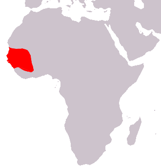 Carte de répartition du babouin de Guinée (Papio papio).